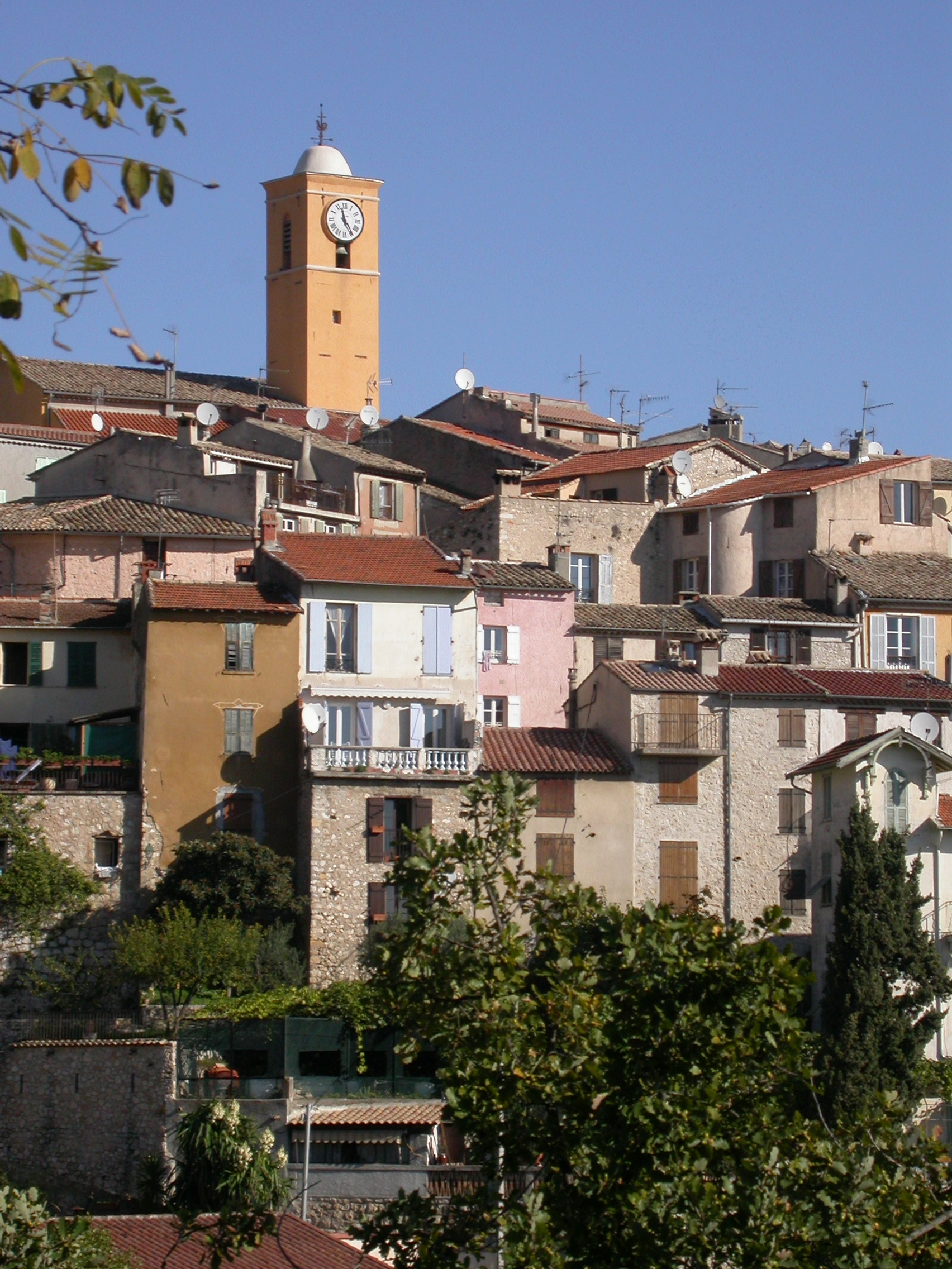 vue de Gattières